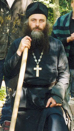 Протоиерей Сергей Иванников